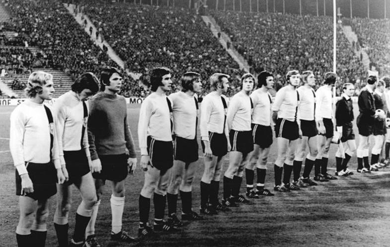 ADN-ZB-Mittelstädt-13.12.73-ma-Berlin: DDR-Sportler des Jahres 1973. Mannschaft: Dynamo Dresden. In der traditionellen Umfrage der Zeitung Junge Welt wurden bei den Mannschaften die Fußballspieler von Dynamo Dresden DDR-Sportler des Jahres 1973. Unser Foto zeigt die Dresdner vor dem Europapokalspiel am 24.10.73 in München gegen Bayern München. V.l.: Heidler, Sachse, Torwart Boden, Häfner, Dörner, Wätzlich, Helm, Schade, Geyer, Rau und Ganzera. Sperrfrist: bis 14.12.73. 4.00 Uhr